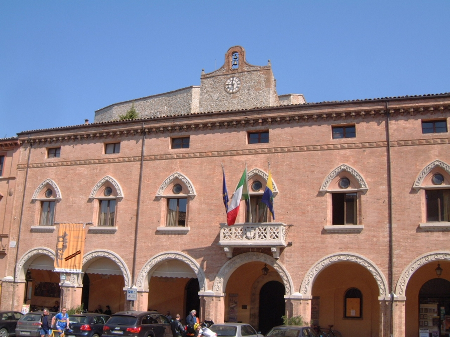 Marie de la commune de Verucchio (Rimini), Italie